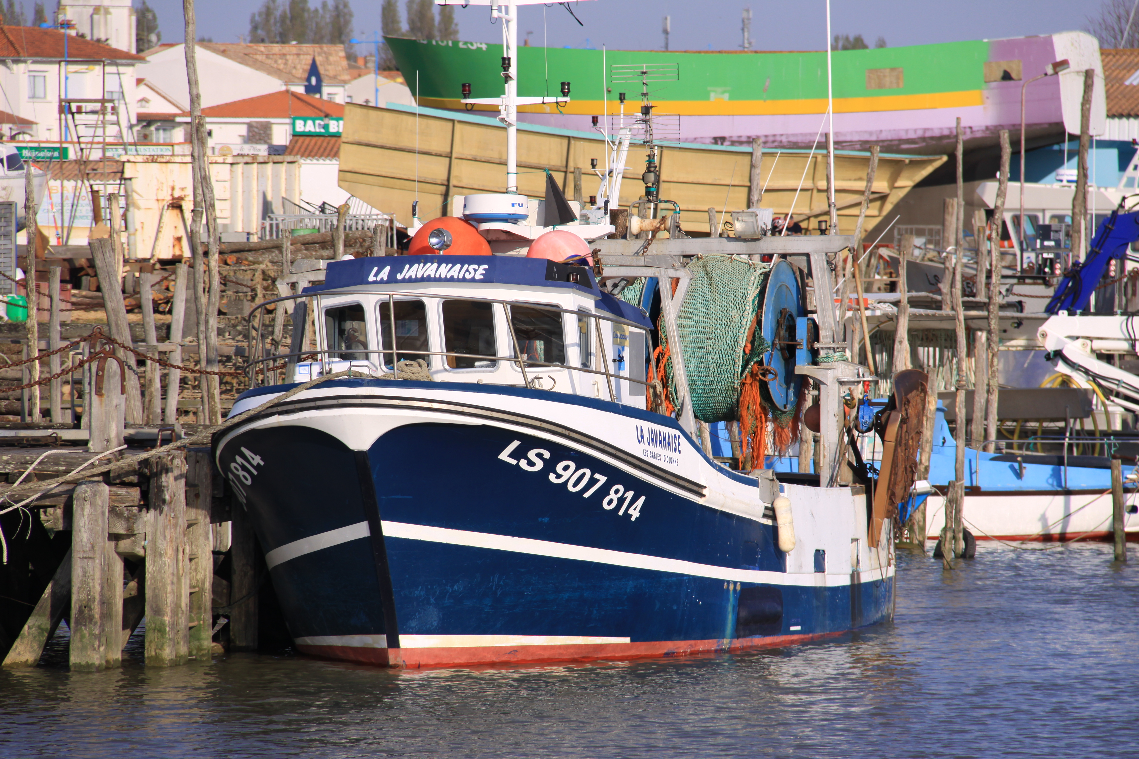 Le chalutier de pêche côtière "La Javanaise" immatriculé LS 907 814 (quartier maritime des Sables d'Olonne) amarré dans le port de L'Aiguillon-sur-Mer. Ce bateau de pêche a été construit en 1997. L'Aiguillon-sur-Mer, Vendée, France.